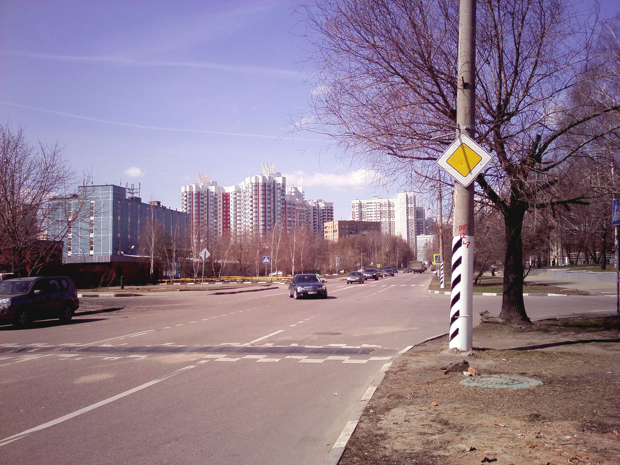 фотография улицы Москворечье, дом 45, корпус 1